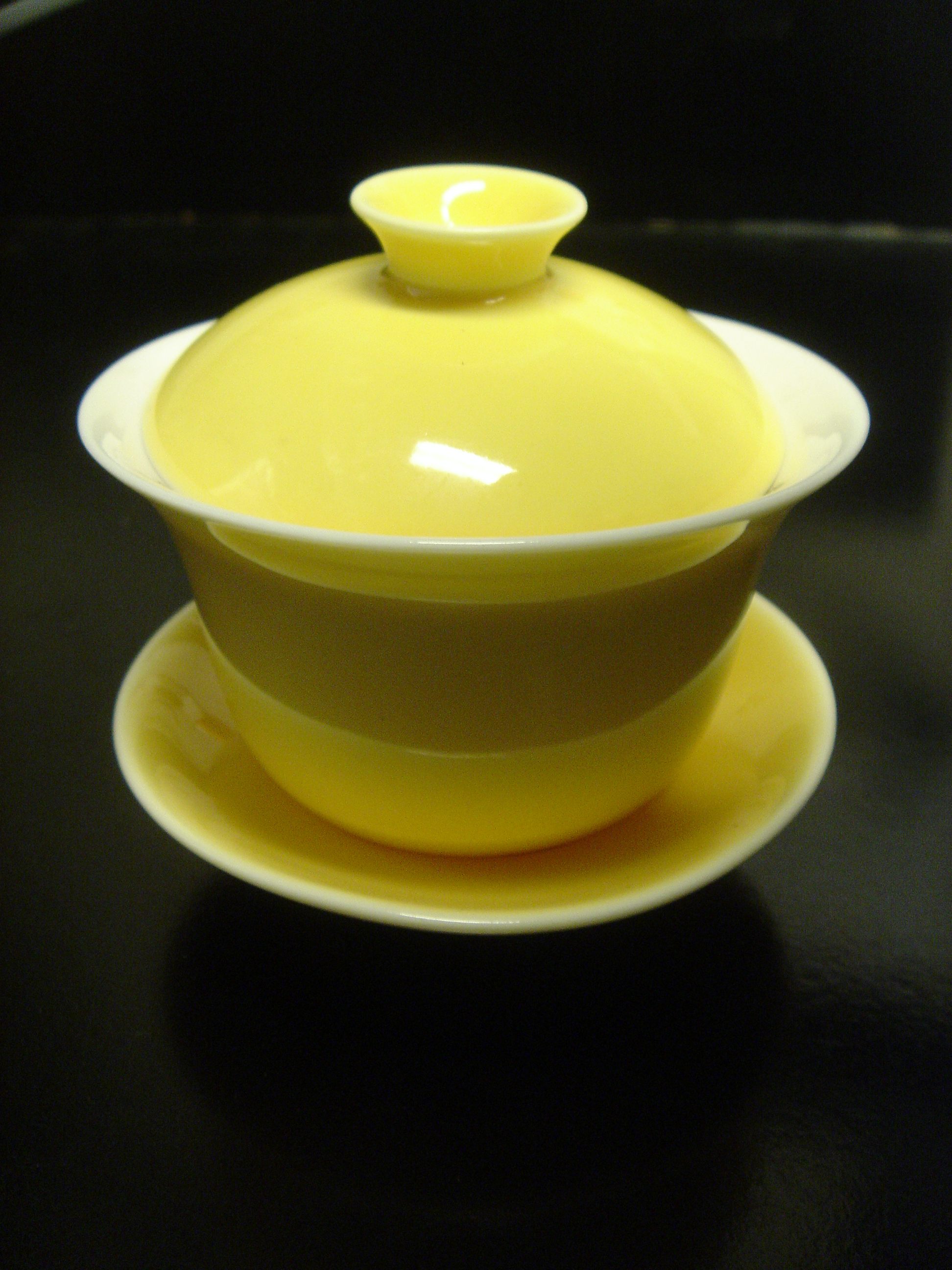 A Yellow porcelian gaiwan